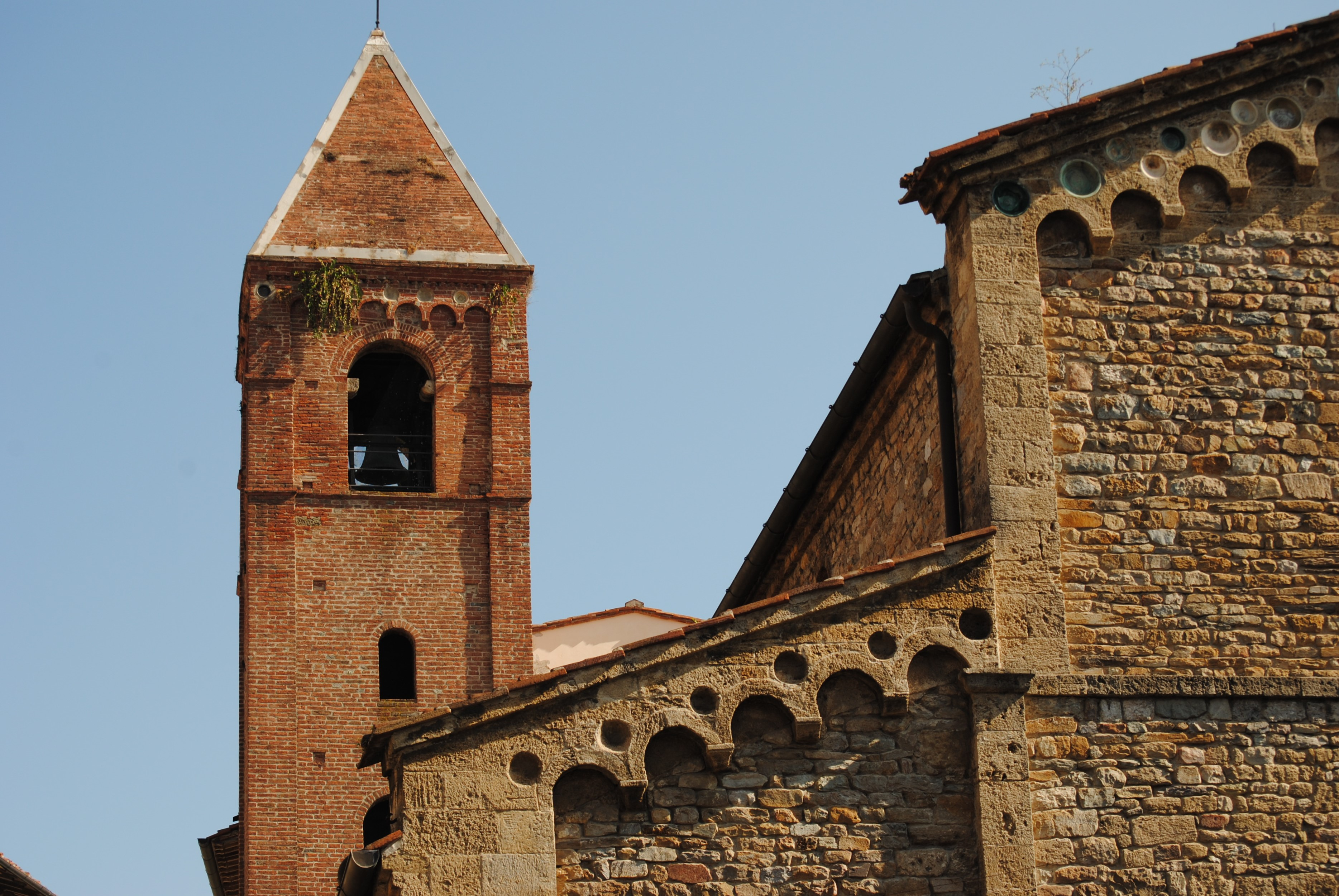 Chiesa di San Sisto (Pisa) - Dettaglio navata laterale e campanile decorati con bacini ceramici. Sono ancora evidenti gli spazi adibiti per accogliere i recipienti di ceramica.